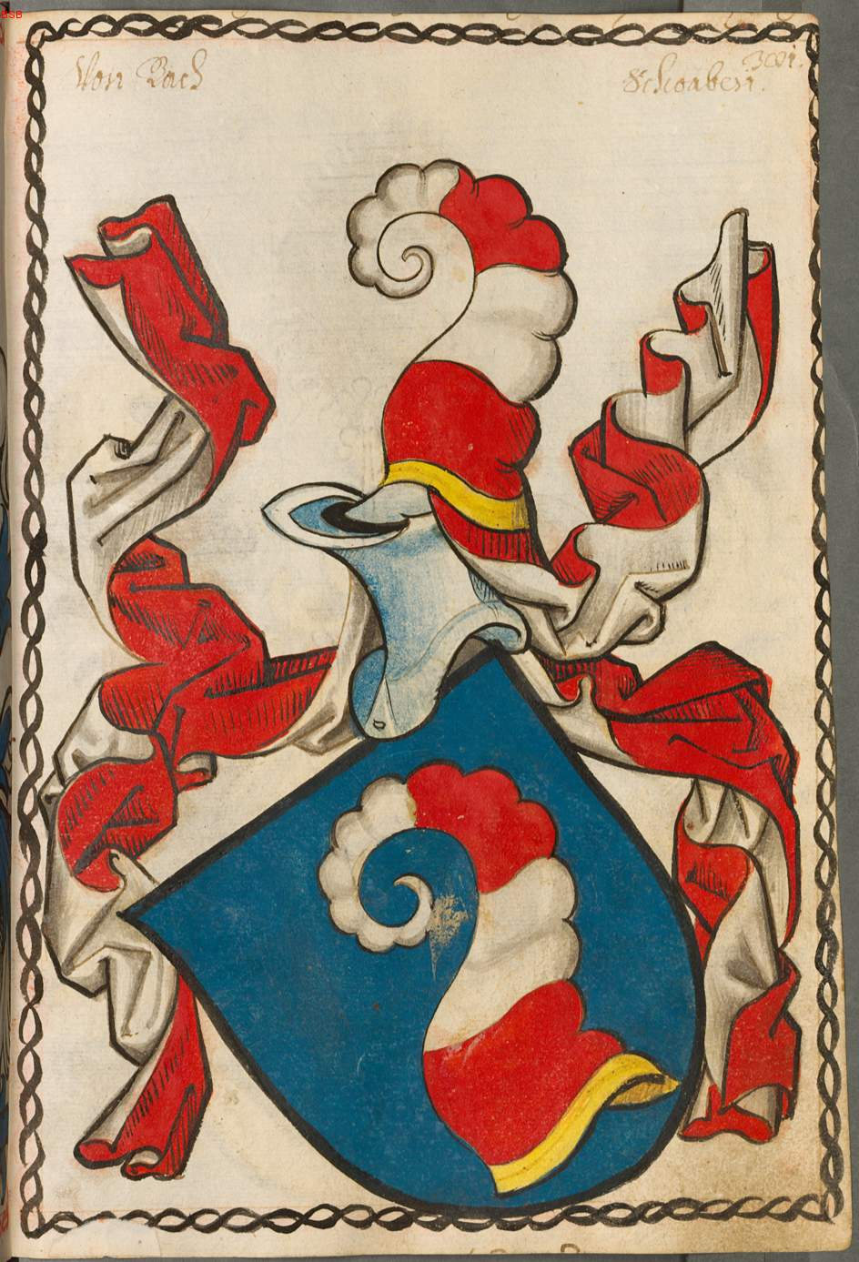 Scheibler'sches Wappenbuch, älterer Teil Schwaben Seite 381